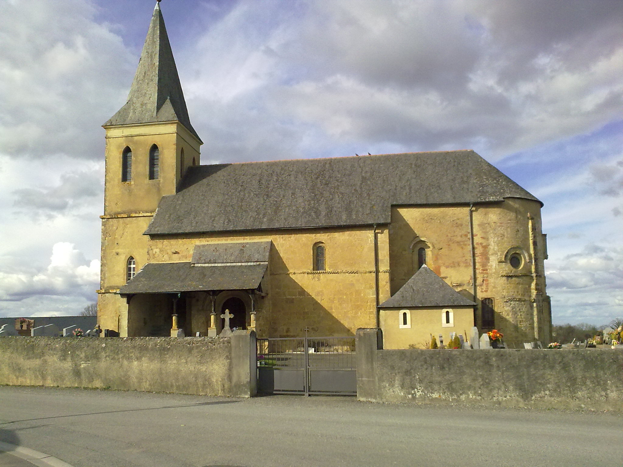 Eglise de Simacourbe